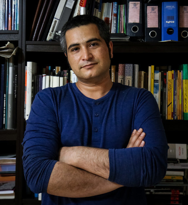 حامد رجبی در خبرگزاری مهر